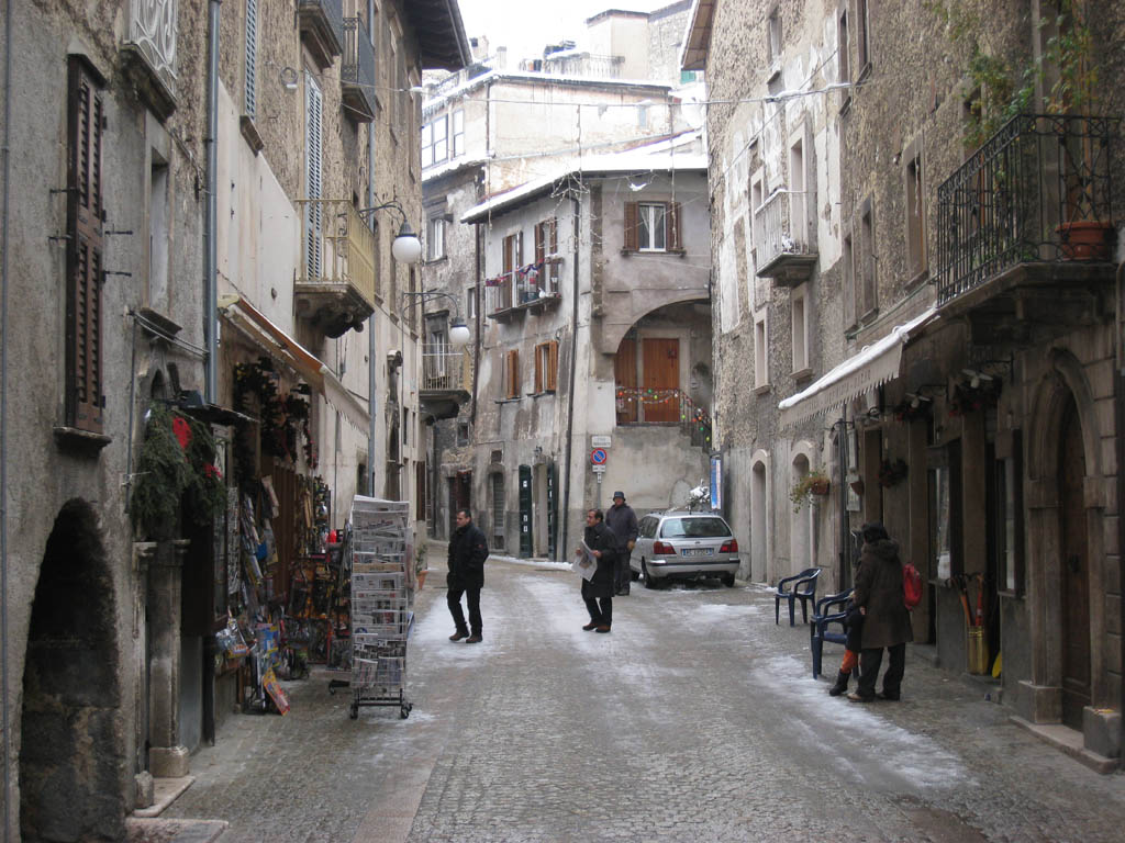 I vicoli del centro storico di Scanno